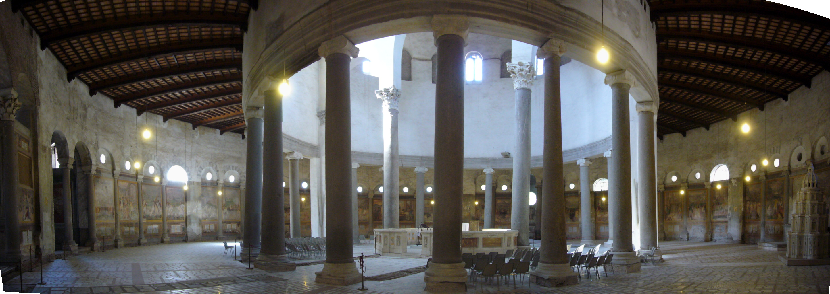 Roma, Santo Stefano Rotondo al Celio: interno dopo il restauro